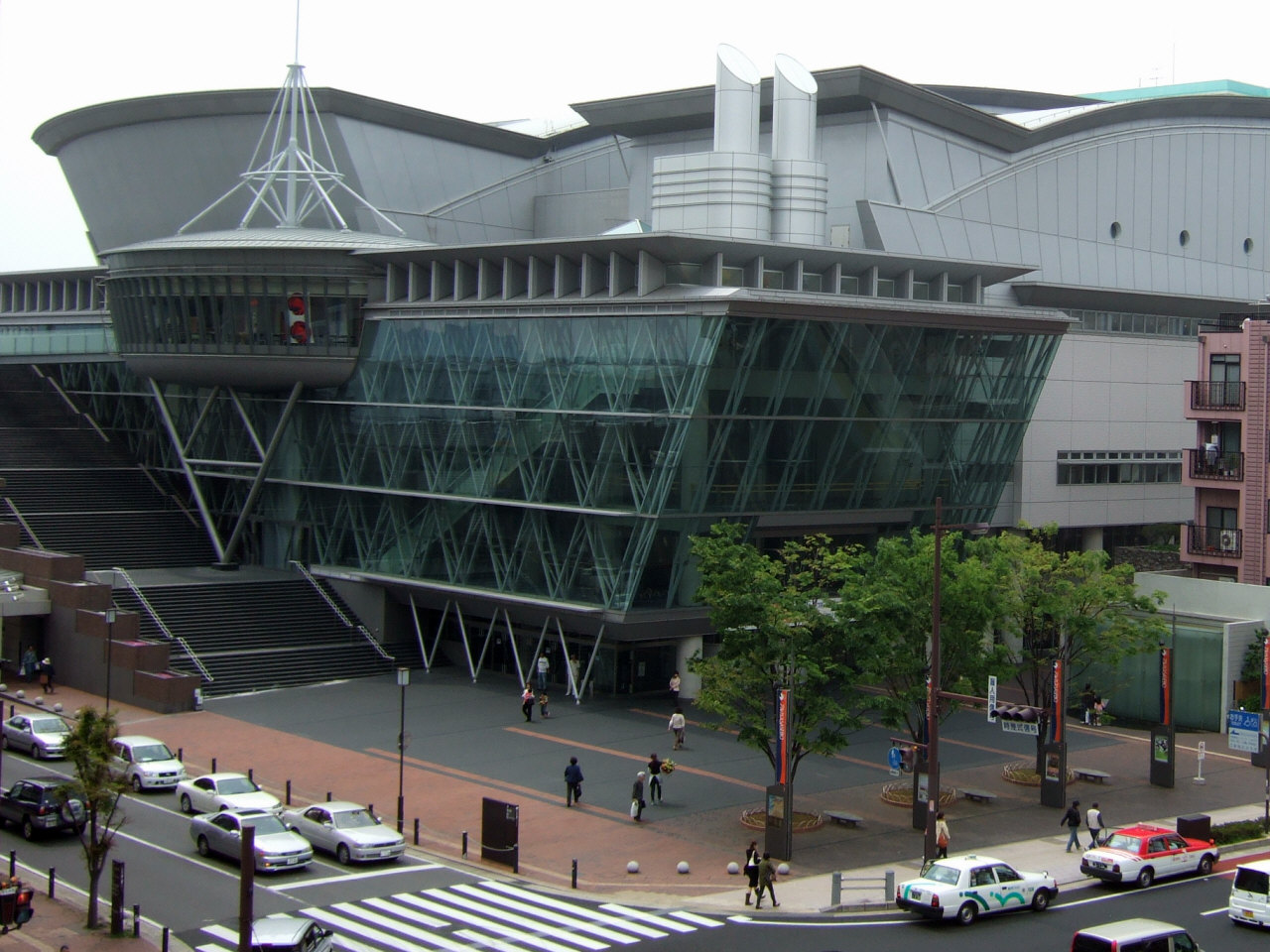 アルカスSASEBO（Arkas Sasebo）：三浦町教会敷地より